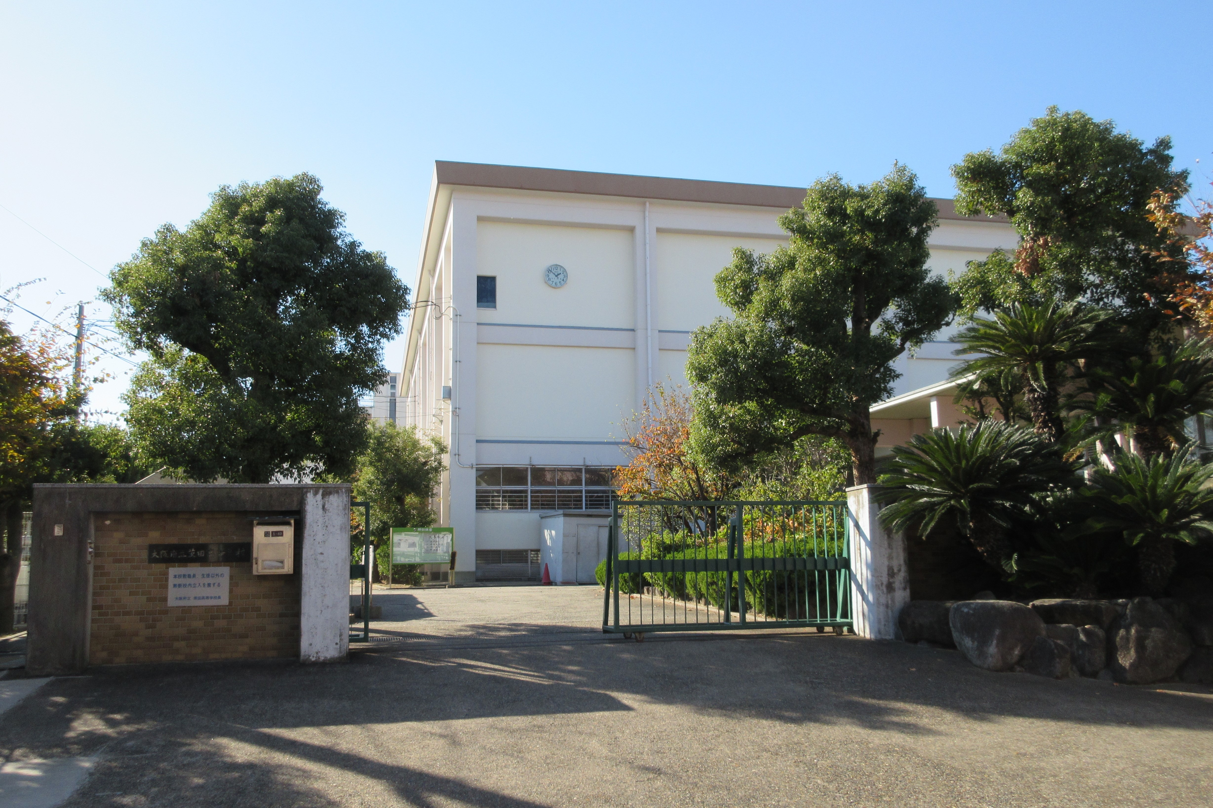 大阪府立茨田高等学校